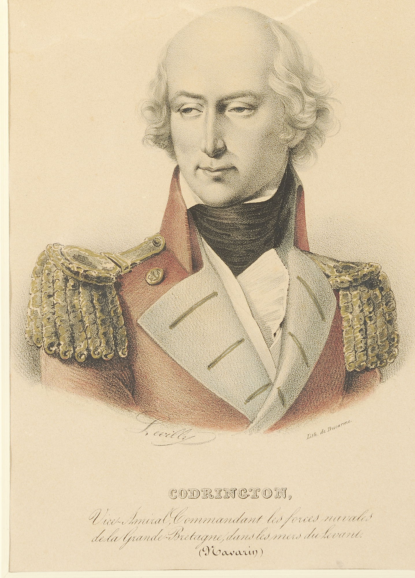 Ο Άγγλος ναύαρχος Έντουαρντ Κόδριγκτον, αρχηγός του συμμαχικού στόλου κατά τη ναυμαχία του Ναβαρίνου το 1827. Επιζωγραφισμένη λιθογραφία του Levilly. Εθνικό Ιστορικό Μουσείο, Συλλογή Χαρακτικών. (4712).